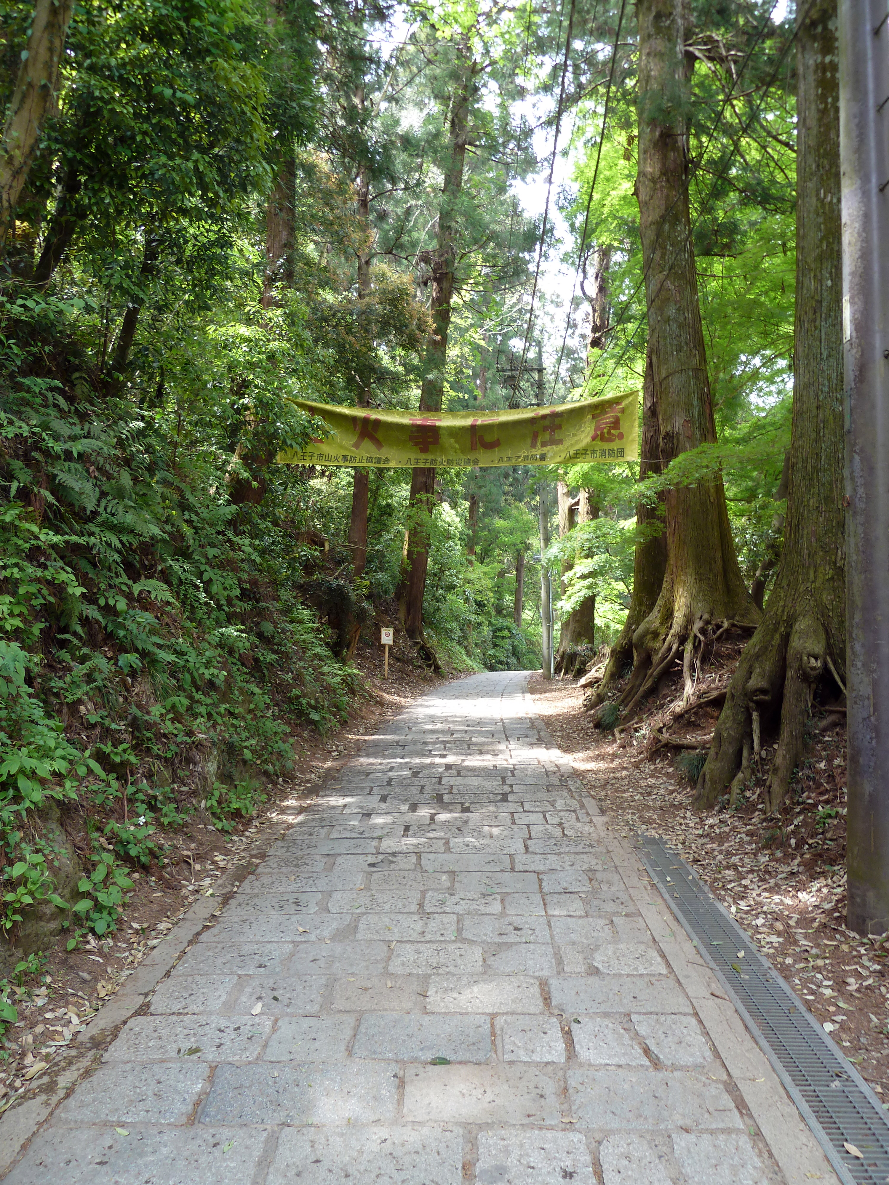 Mount Takao - Trail 1